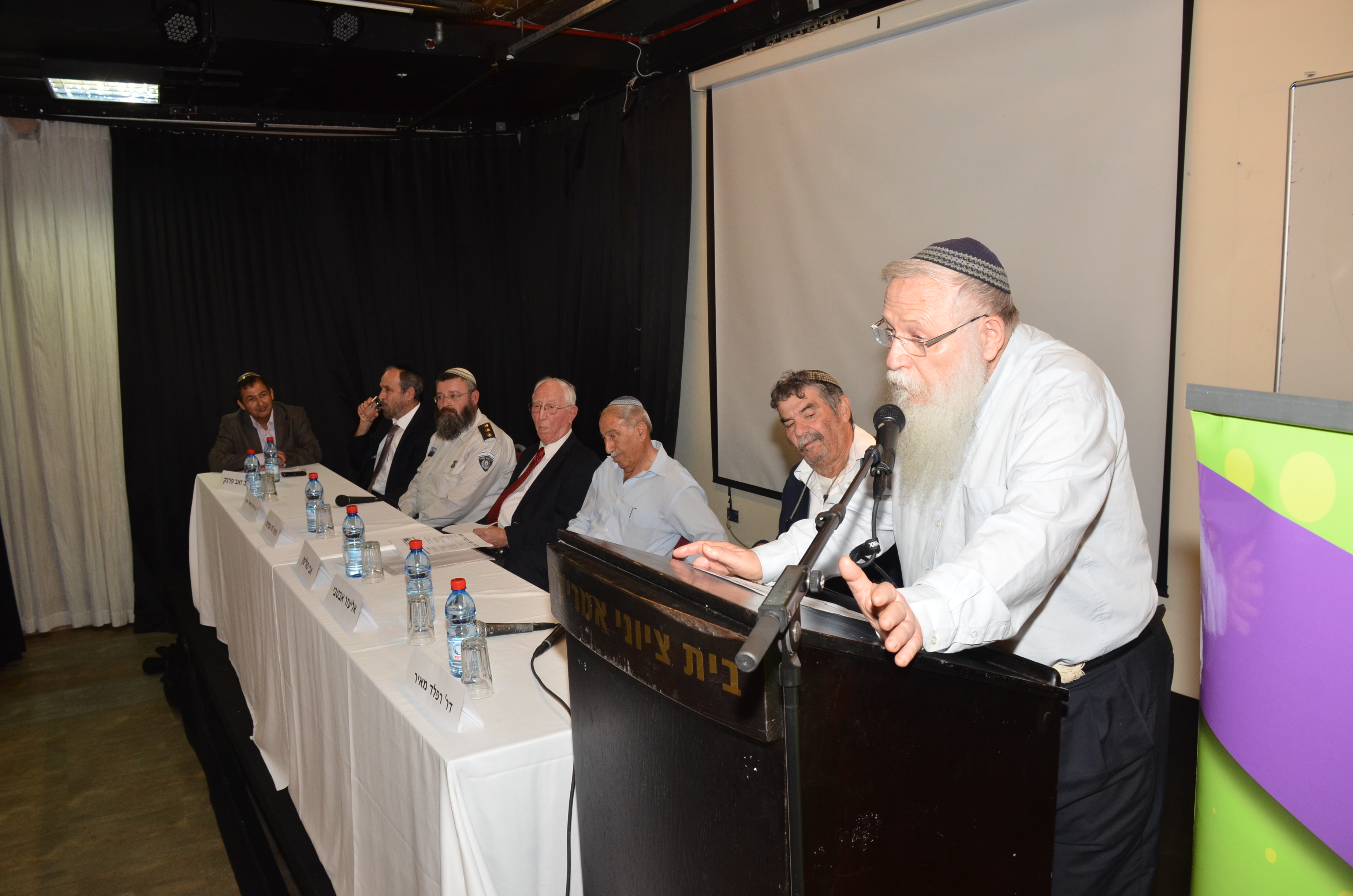 הרב חיים דרוקמן מברך בטקס פרס עמינח תשע"ג בית ציוני אמריקה תל אביב